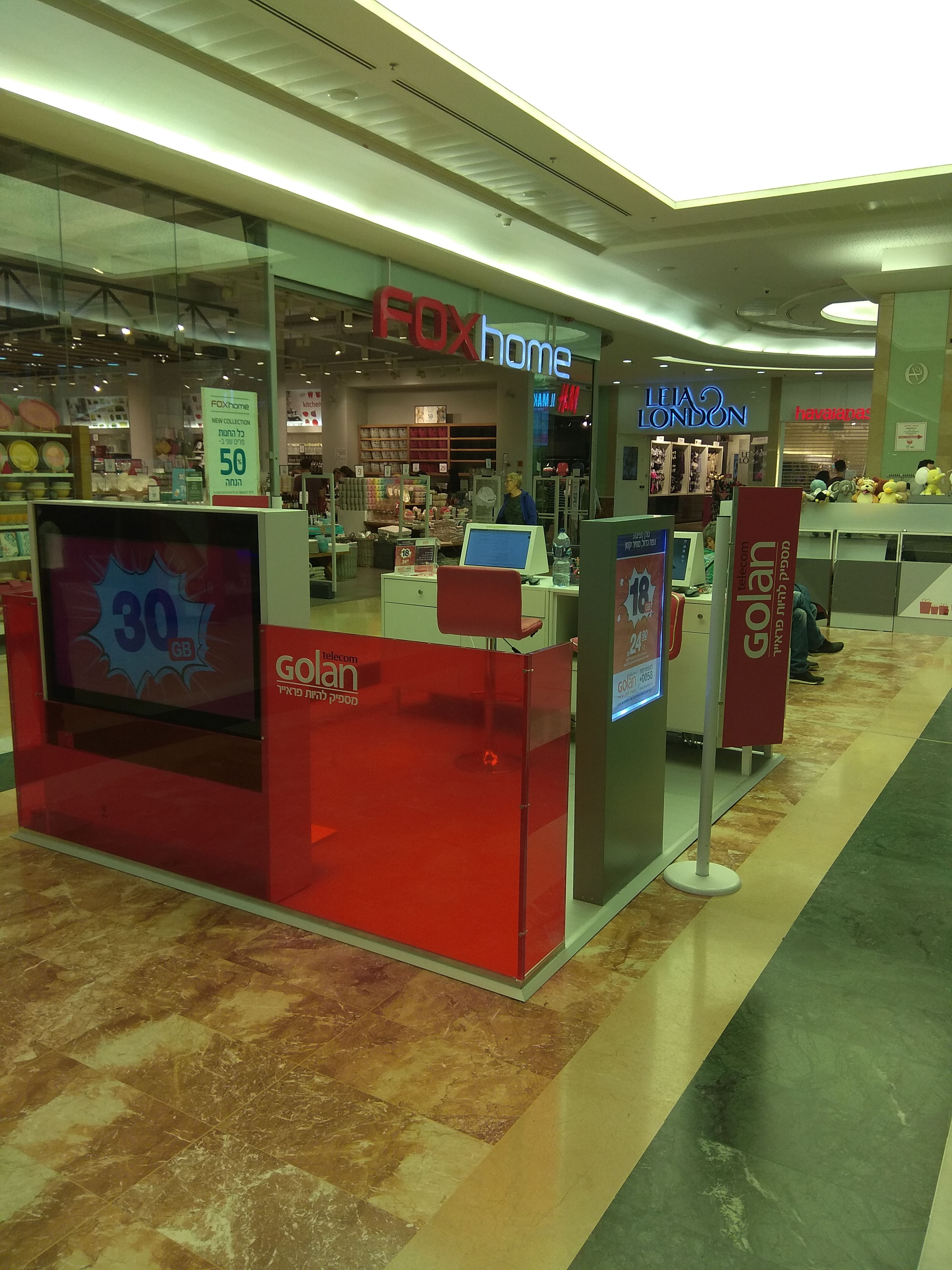 דוכן שירות ומכירות של גולן טלקום בקניון